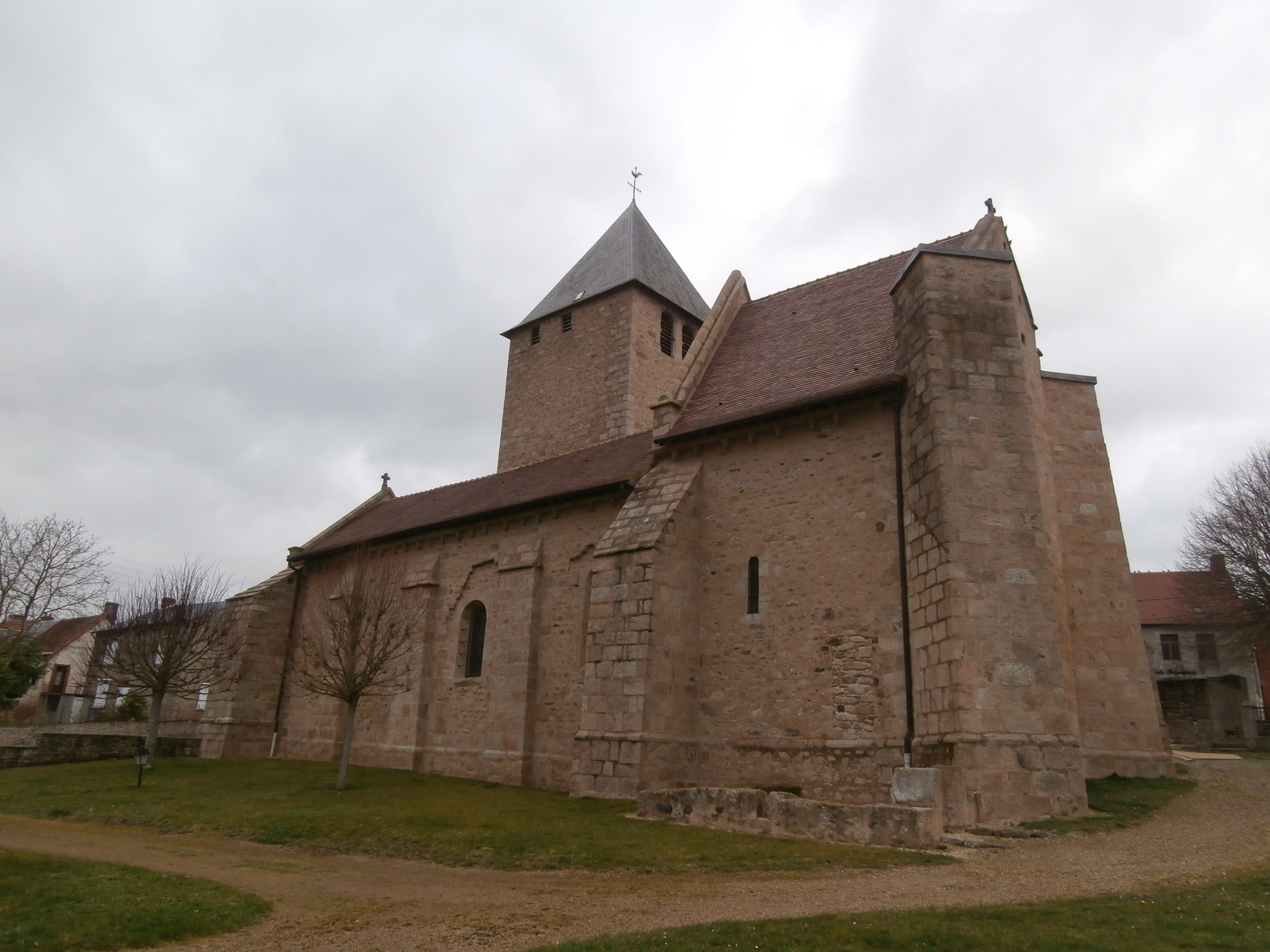 Eglise St Sulpice de Bourges (commune de St Sulpice le Dunois)